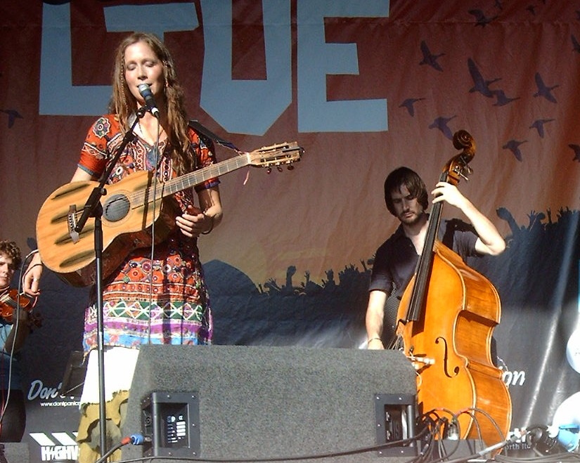 Lou Rhodes